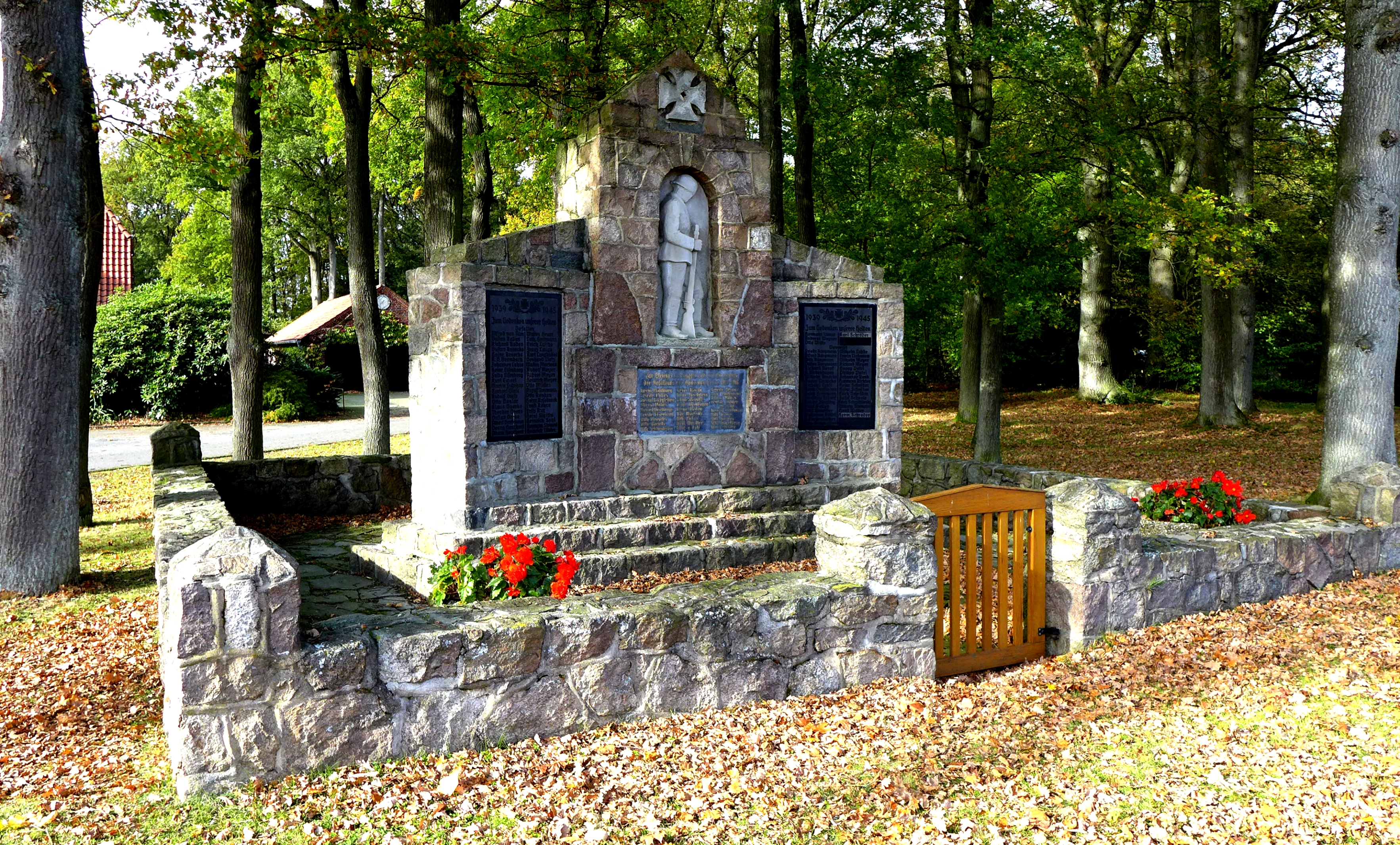 Im Jahre 1923 wurde ein Kriegerdenkmal für die Gefallenen und Vermissten des 1. Weltkrieges 1914/18 errichtet. Siehe Inschrift der mittleren Schriftplatte: "Zur Ehrung der Kämpfer und zum Gedächtnis der Gefallenen der Gemeinde Heber 1914-1918." Im Jahre 1953 wurden zwei Flügel dem Ehrenmal hinzugefügt für die Gefallenen des 2. Weltkrieges 1939 bis 1945. Inschriften der linken und rechten Schrifttafeln: "Zum Gedenken unserer Helden".